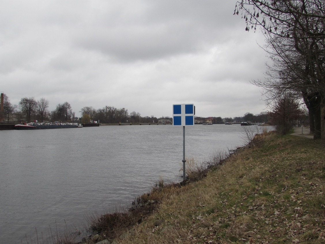 Wasserstraßenkreuzung in Brandenburg an der Havel; unten Silokanal,links Beetzsee-Riewendsee-Wasserstraße, rechts Stadthavel, geradezu Schleusenkanal Vorstadtschleuse